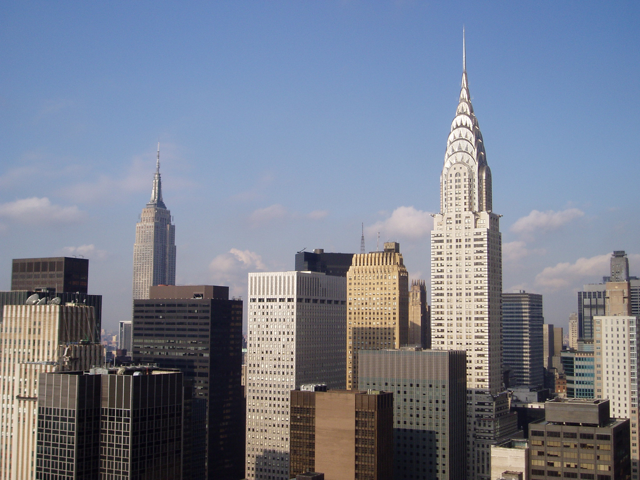 Milenium Plaza view from 36 floor